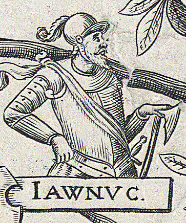 Беларуская (тарашкевіца): Уяўны партрэт вялікага князя Яўнута (Jaŭnut)